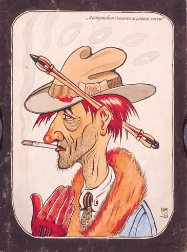 Сяброўскі шарж на мастака Генадзя Змудзінскага